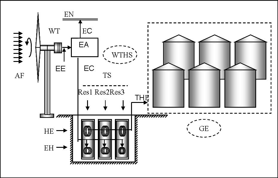 Вітротурбінна система теплопостачання зернового елеватора